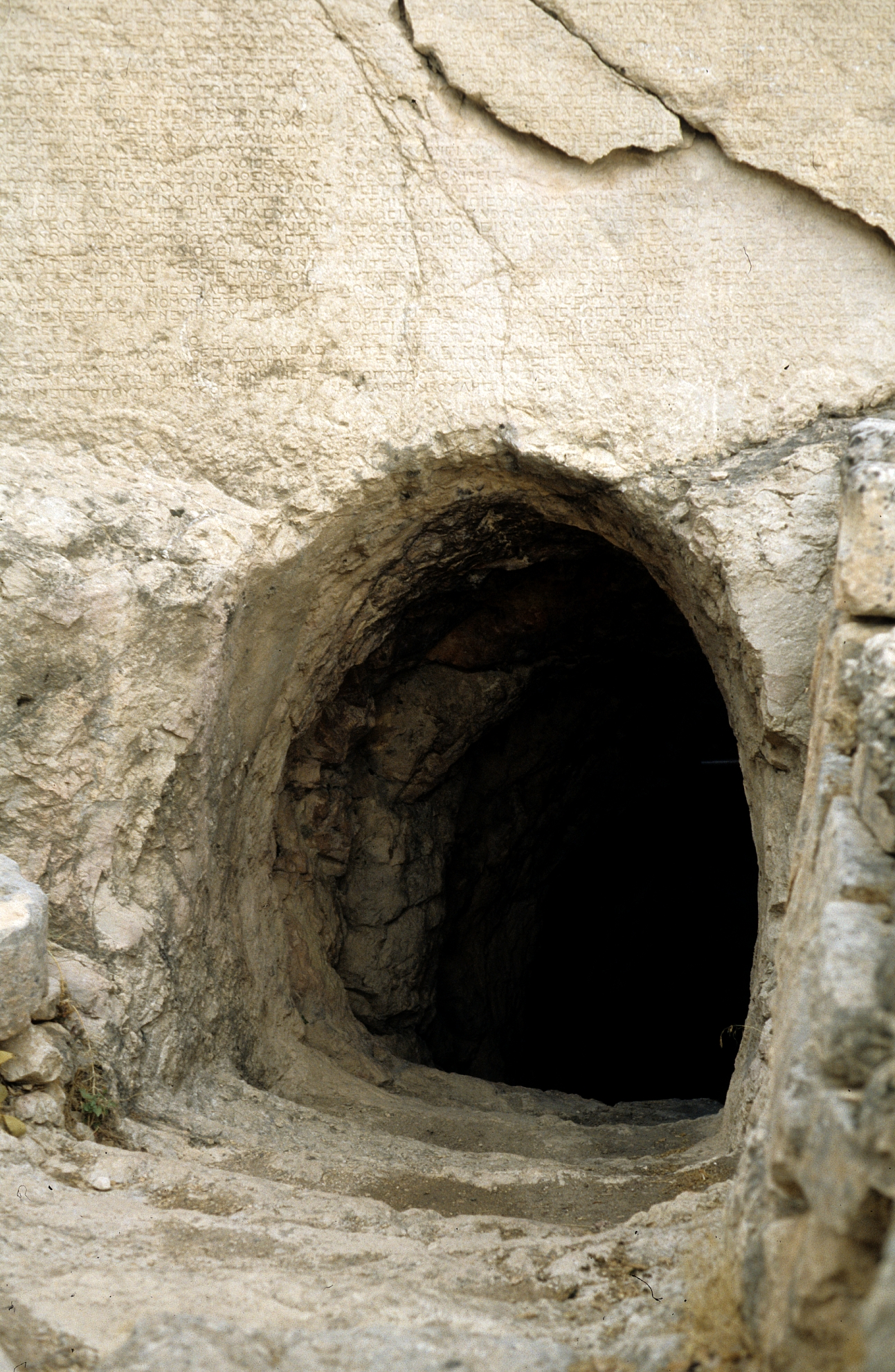 Arsameia am Nymphaios, Türkei, Kommagene, Eingang zu unterirdischem Gang mit Schriftwand